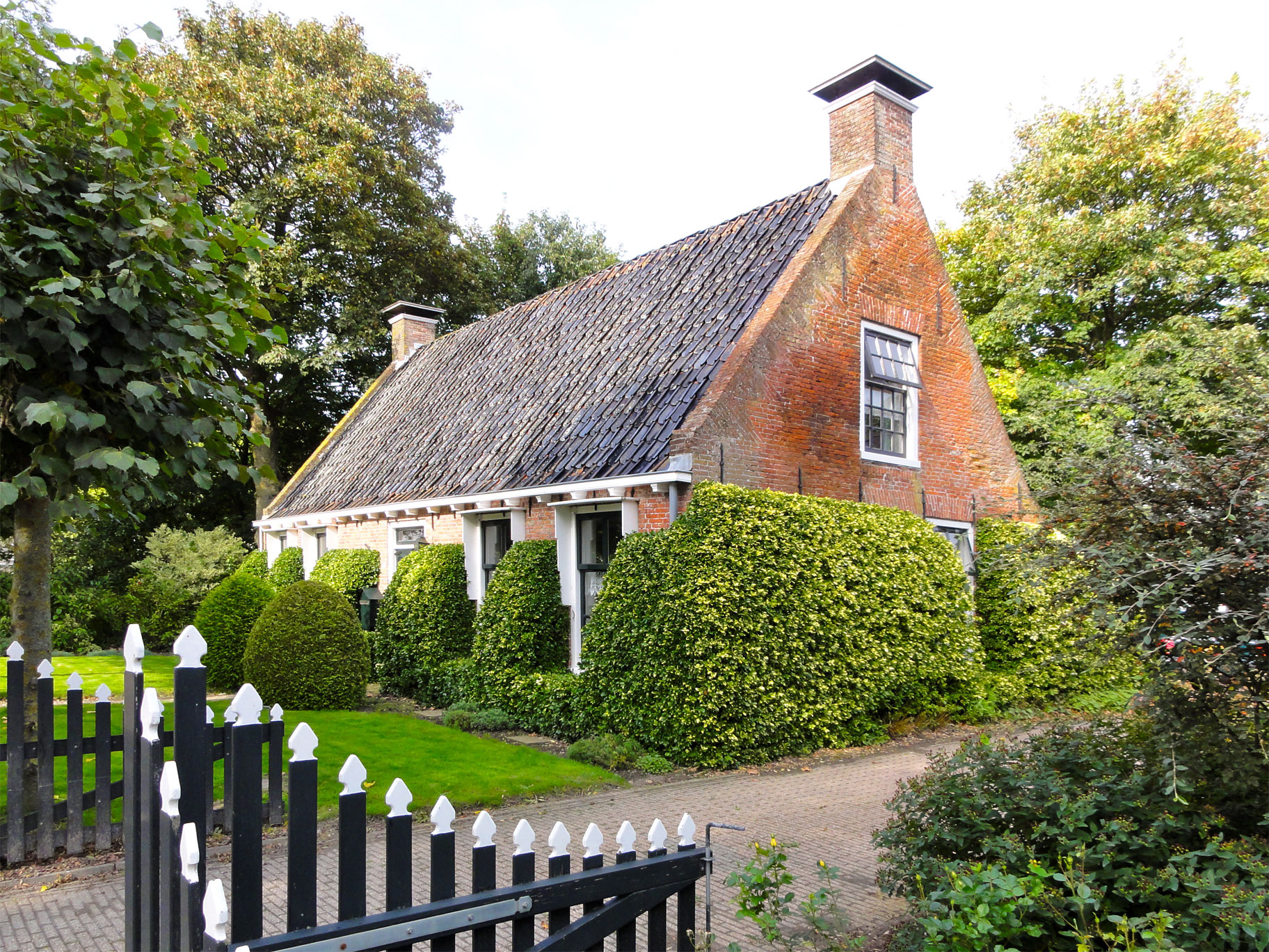 Humaldawei 13 in Ee